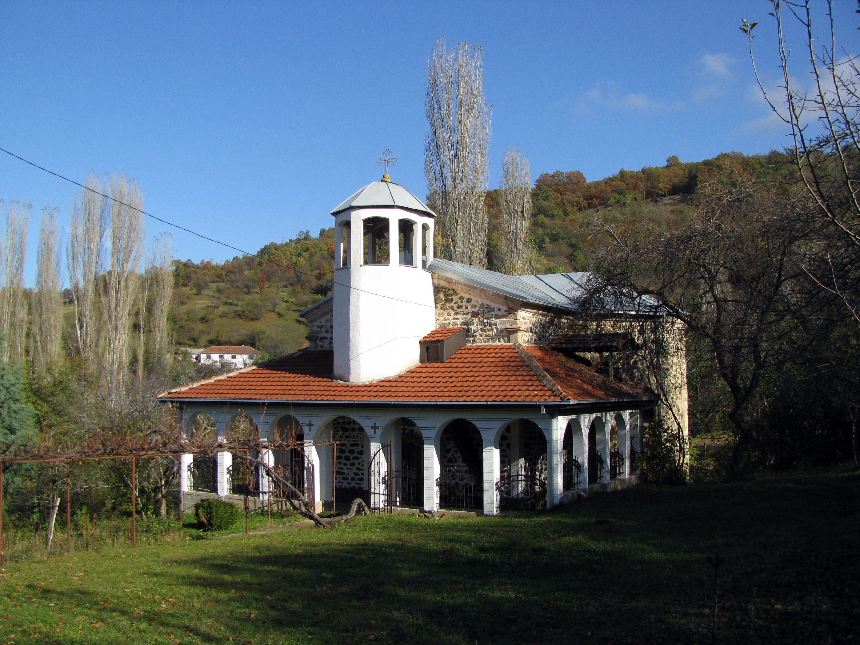 Црква Свети Теодор - Тирон село Конопница, Крива Паланка